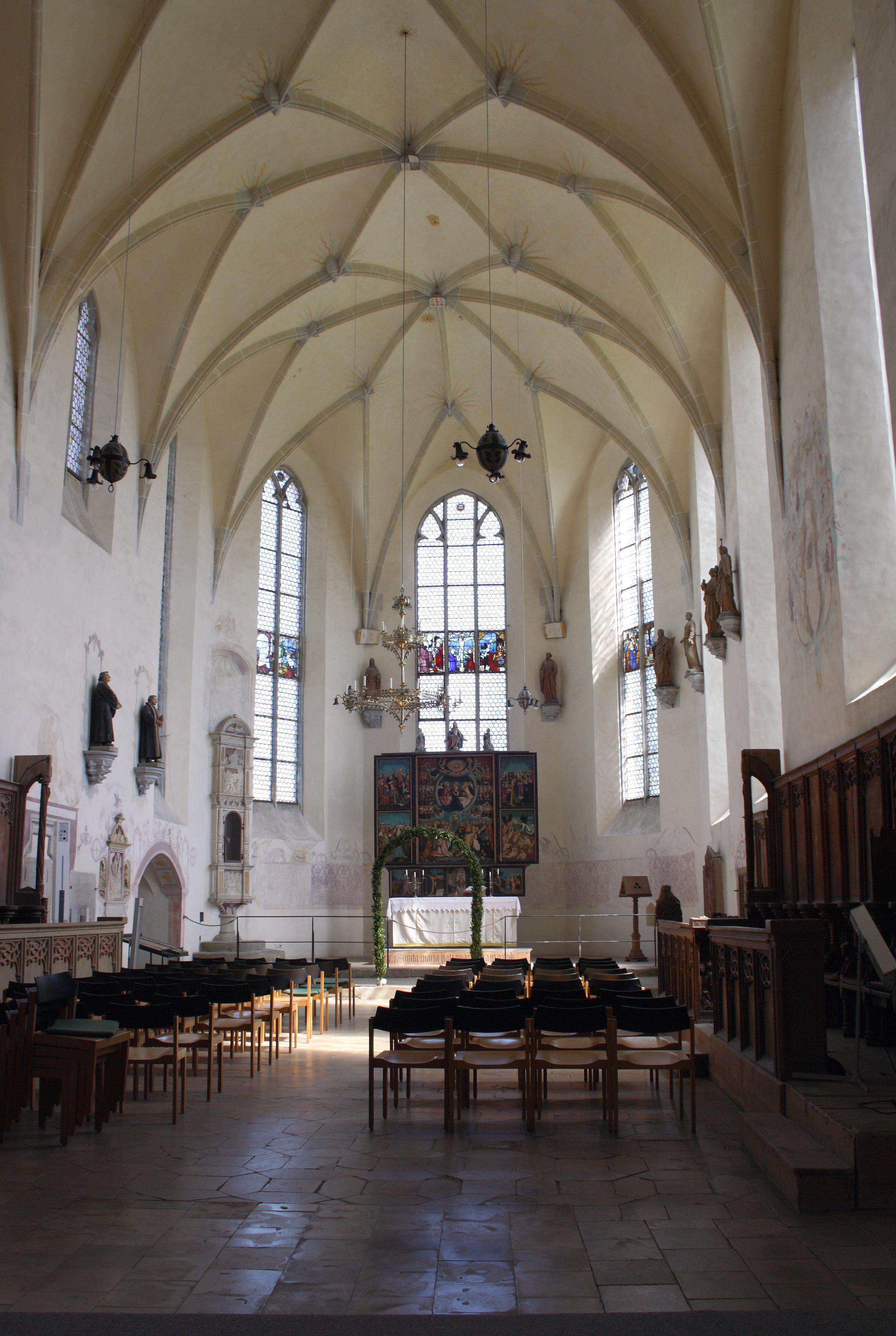 Evangelische Pfarrkirche, ehemalige Benediktinerklosterkirche St. Maria in Auhausen im Landkreis Donau-Ries (Bayern), Chor